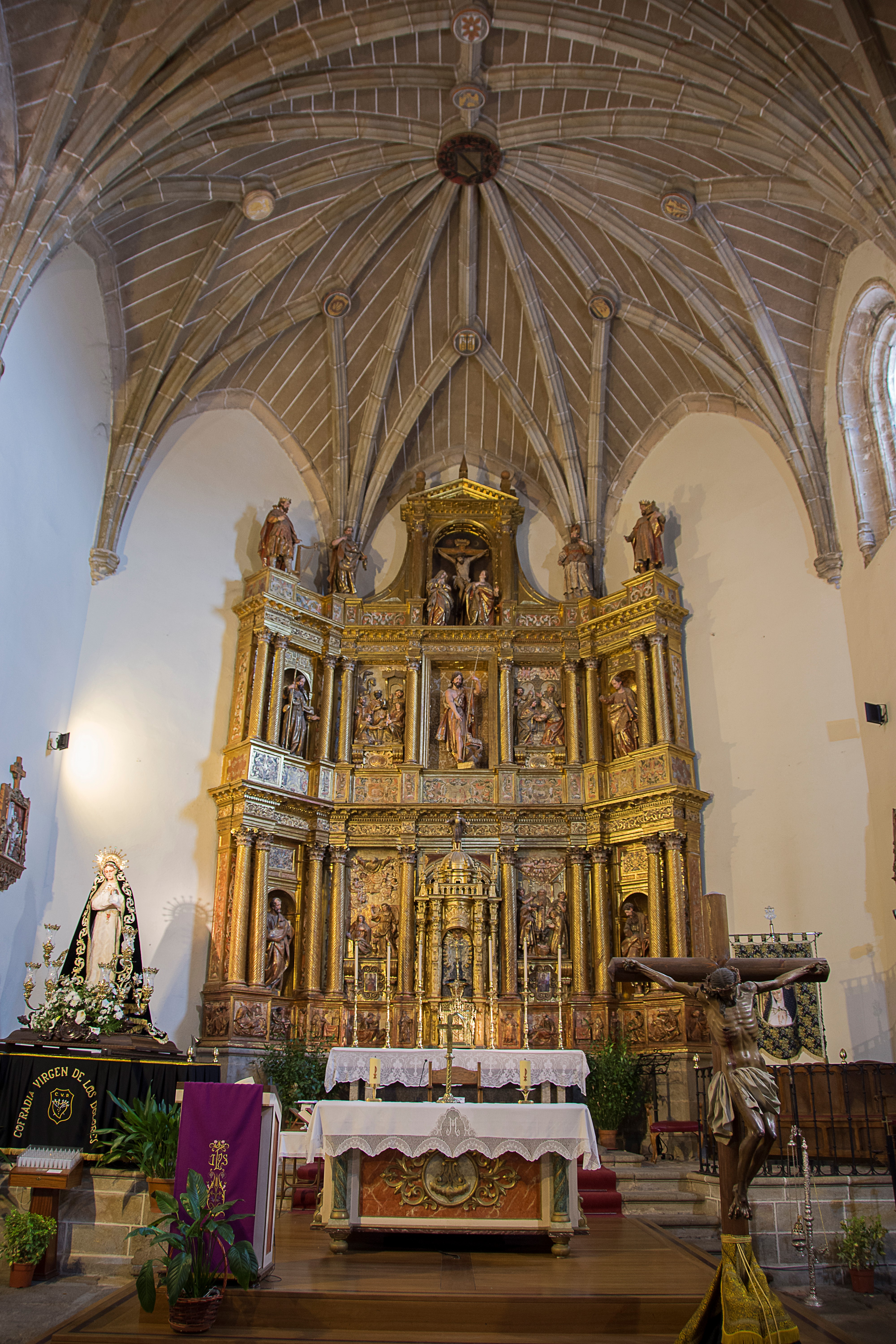 Interior de la iglesia de San Juan Bautista de Malpartida de Plasencia. (Provincia de Cáceres, España)